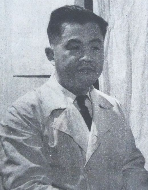 懸田克躬